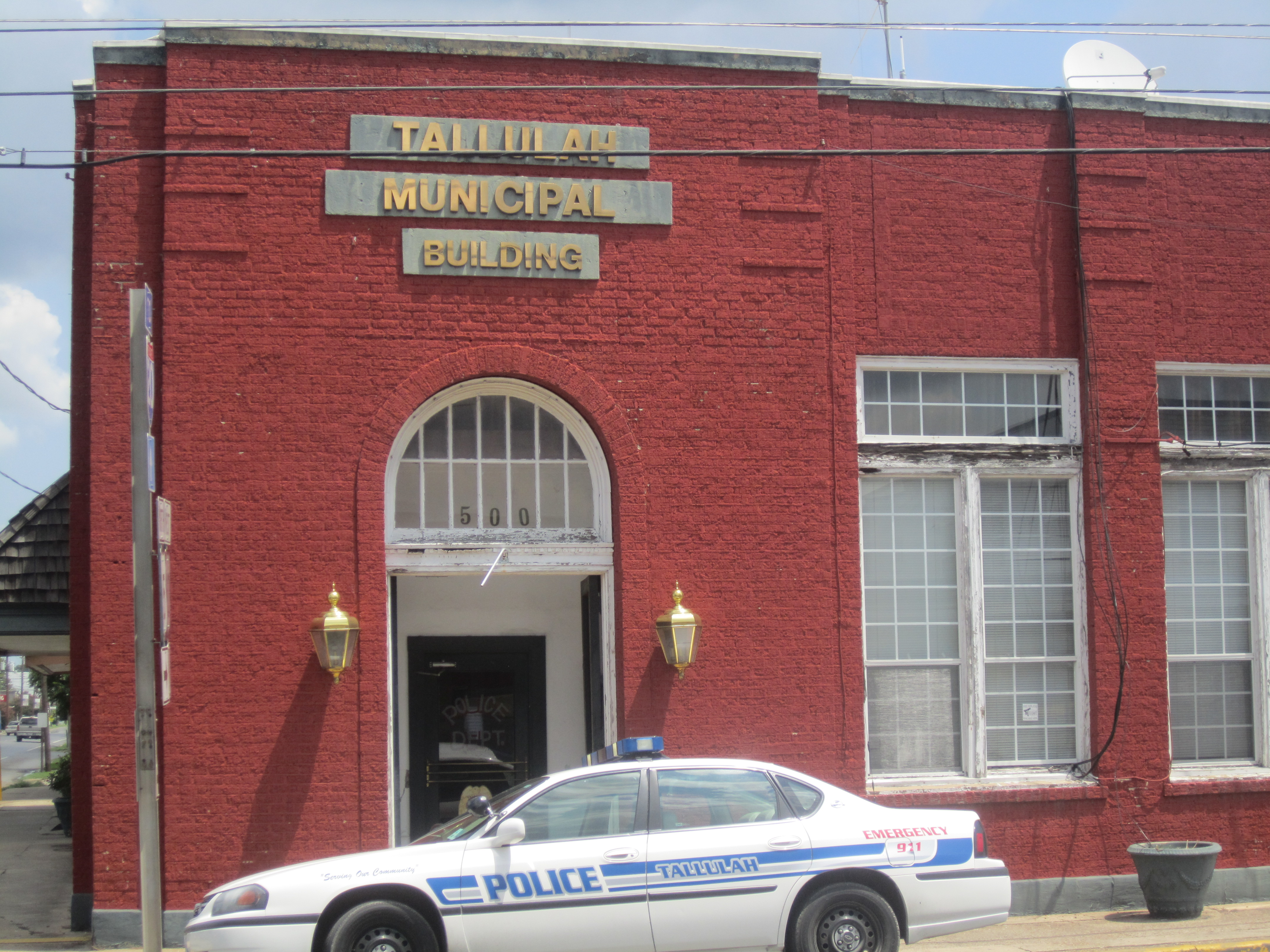 Tallullah, Louisiana, Municipal Building